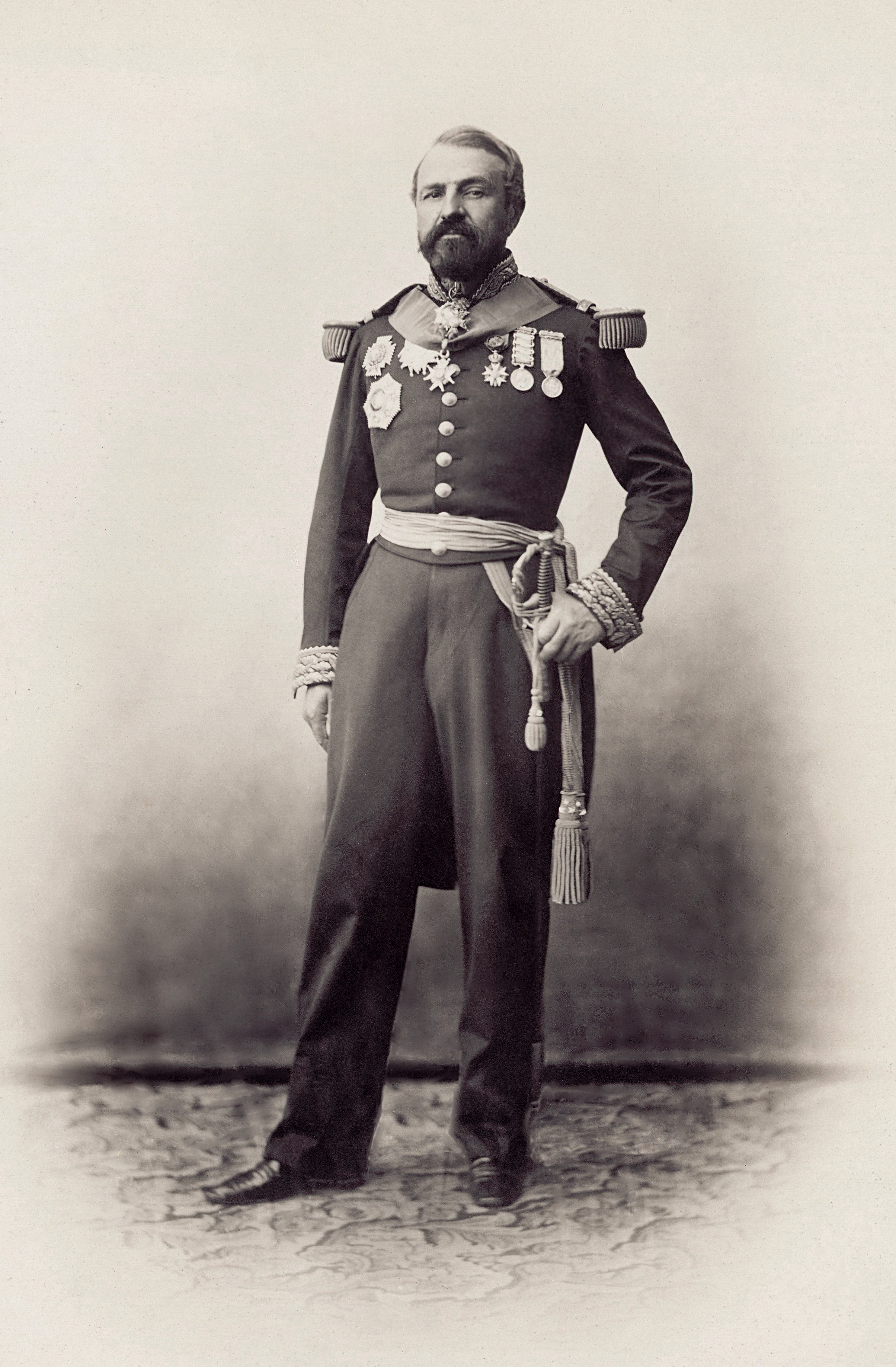 Charles François Xavier d'Autemarre d'Erville (1805-1891), général français du Second Empire.